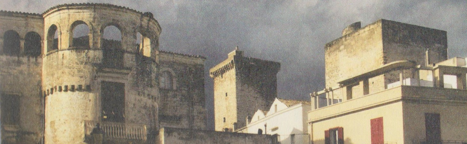 Panoramica sulle Torri del Castello Medievale di Rutigliano